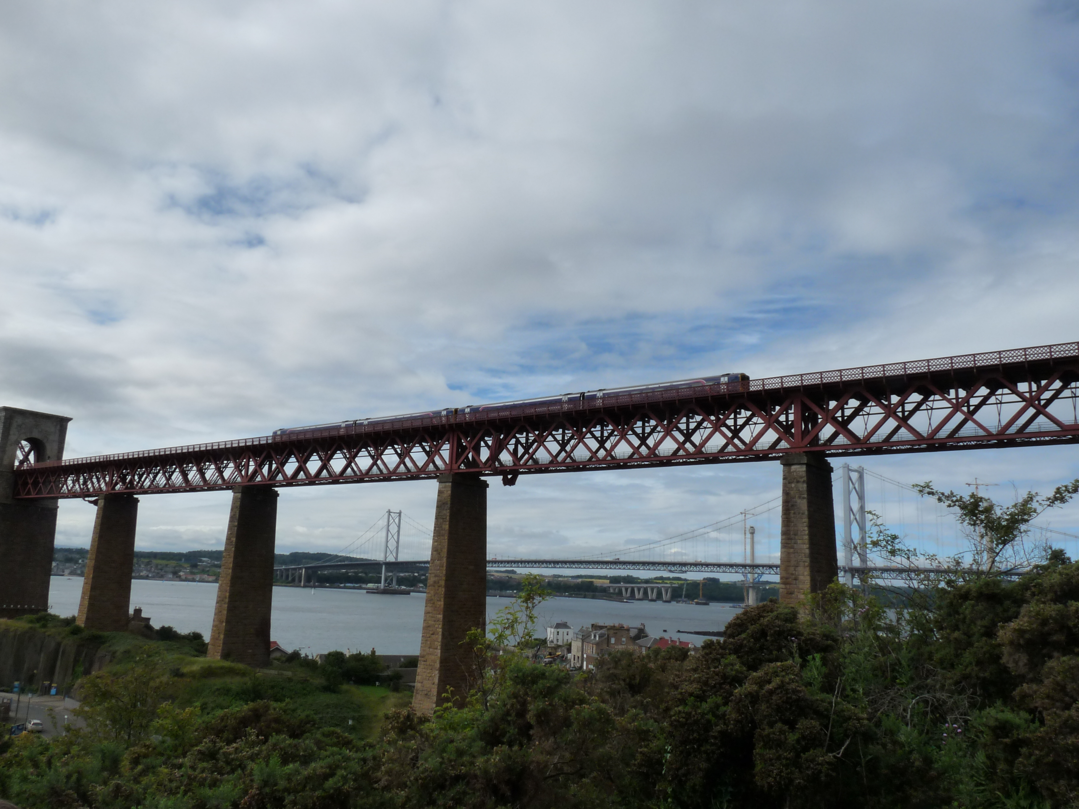 De Forth Bridge met trein